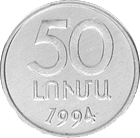 50 лума 1994 года - алюминий, реверс